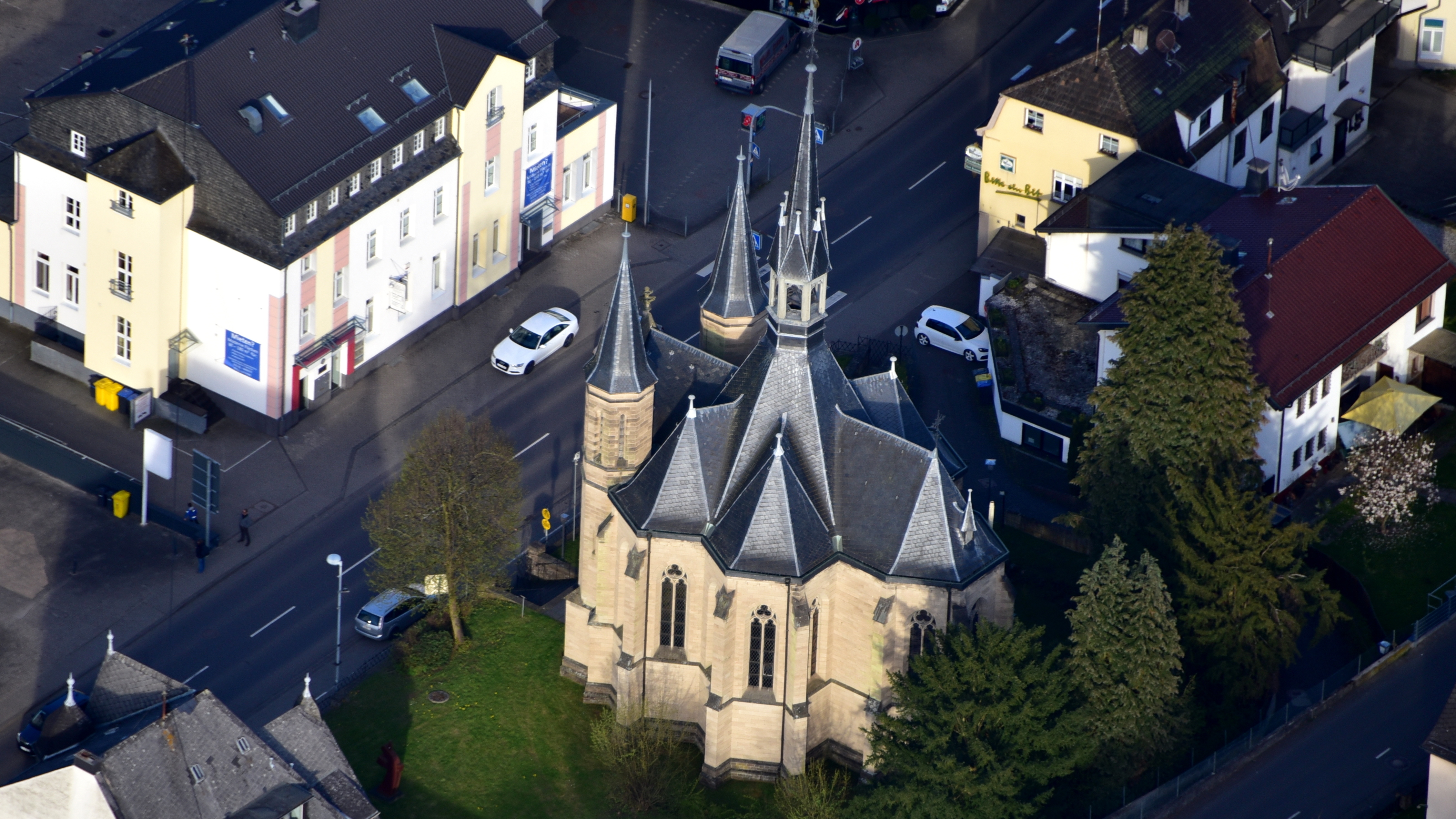 Adenau, Marienkapelle, Luftaufnahme (2016)